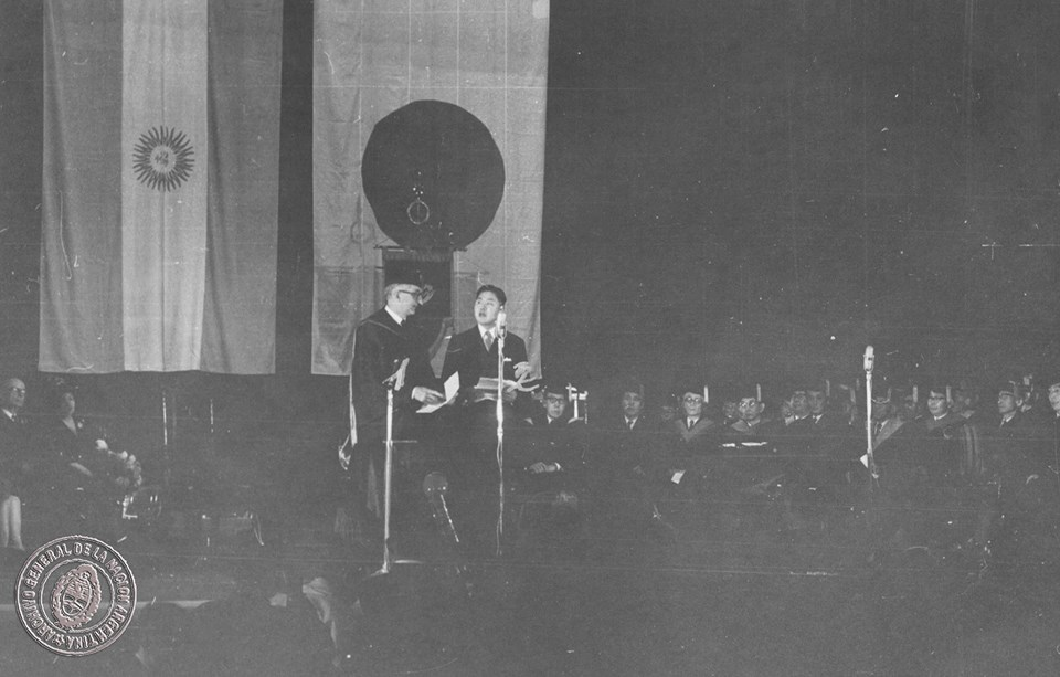 El presidente Frondizi en la Universidad de Waseda (Tokio), donde le otorgaron el título Honoris Causa durante su visita a Japón, 15 de diciembre de 1961. Inventario 281952.